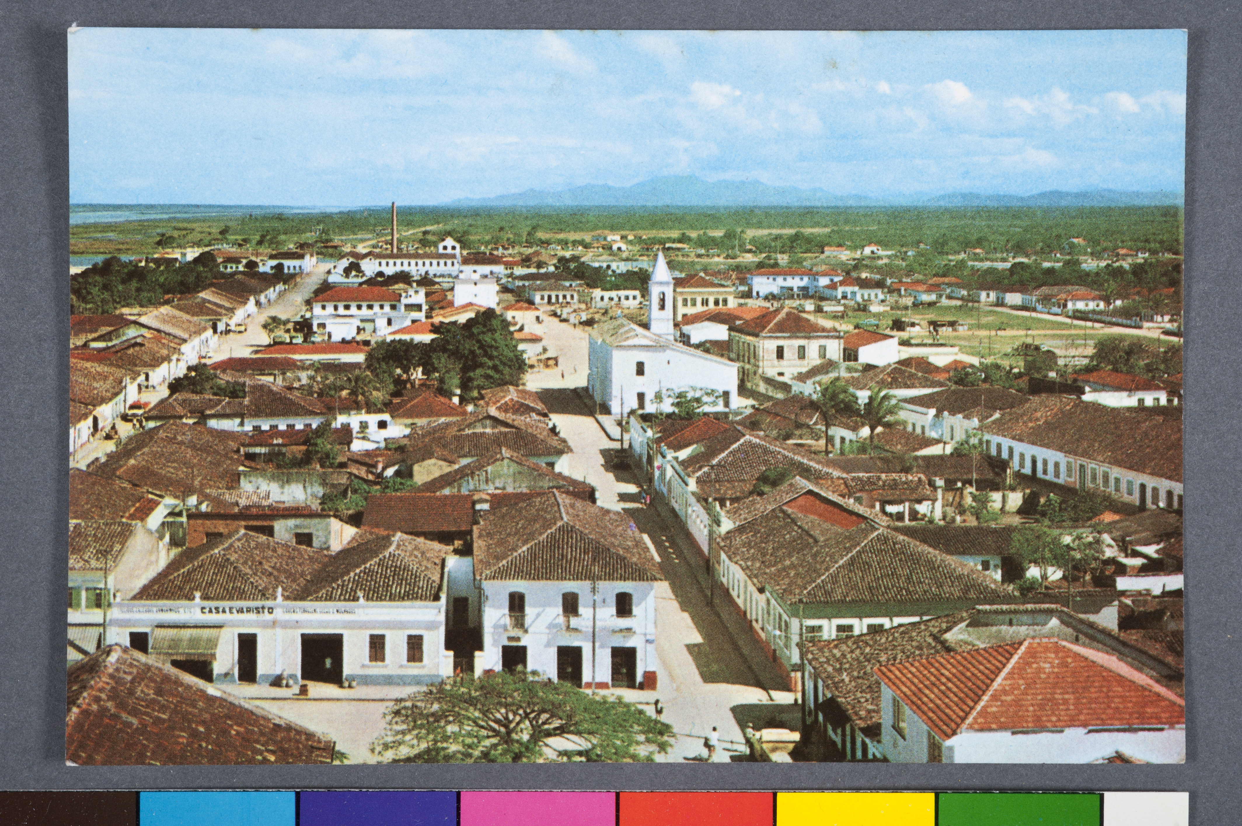 Obra que integra o acervo do Museu Paulista da USP. Coleção João Baptista de Campos Aguirra. Ref. Agente: Folhinhas Scheliga S. A.